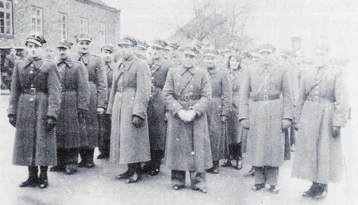 Szczecin, 1946 r. Kadra Szpitala Garnizonowego na apelu porannym